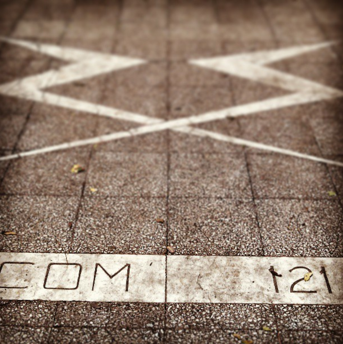 Logo del ex-batallon de comunicaciones121 en el ingreso a lo que era el antiguo casino de oficiales.